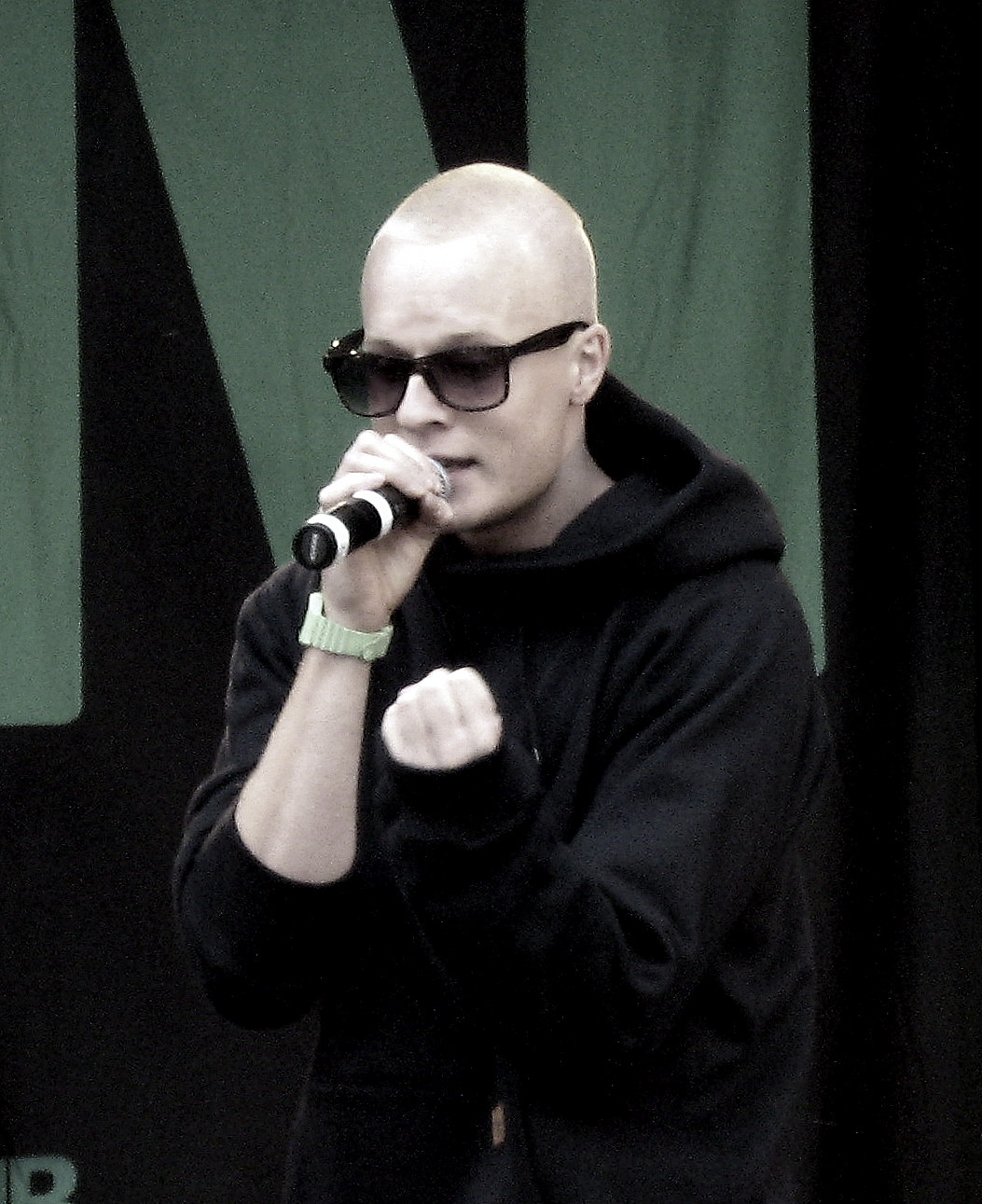 Xander i Hjørring, 2011